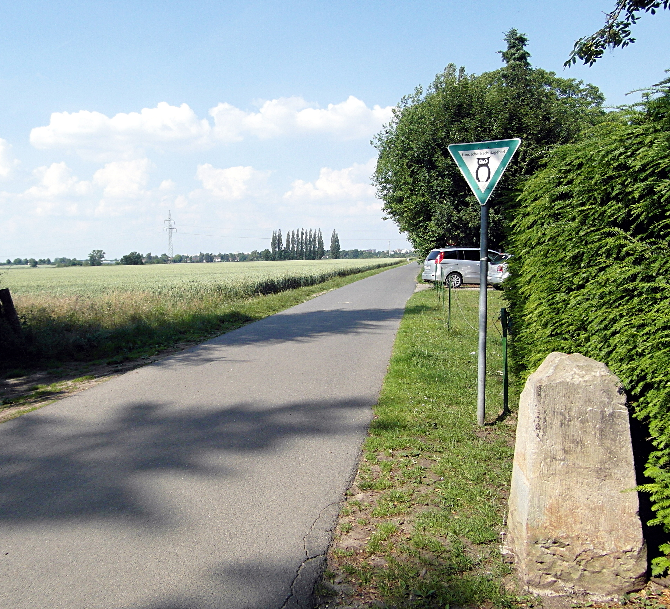 Ihmer Straße in Kückenmühle. Richtung Wettbergen. Hier ist die Stadtgrenze zwischen Ronnenberg und Hannover.